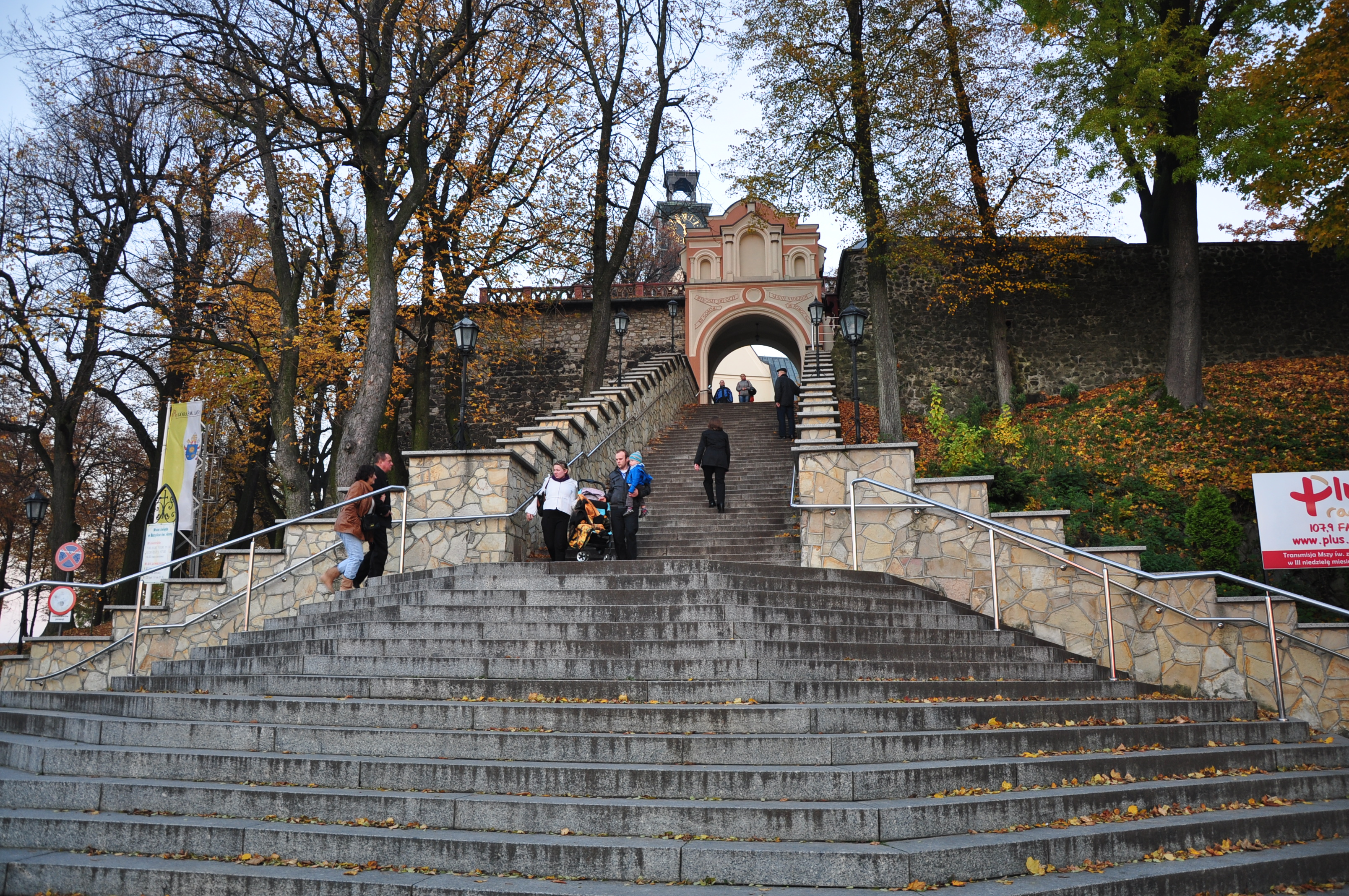 Góra Świętej Anny, kościół p.w. św. Anny, 1480, 1665, XVIII, XIX